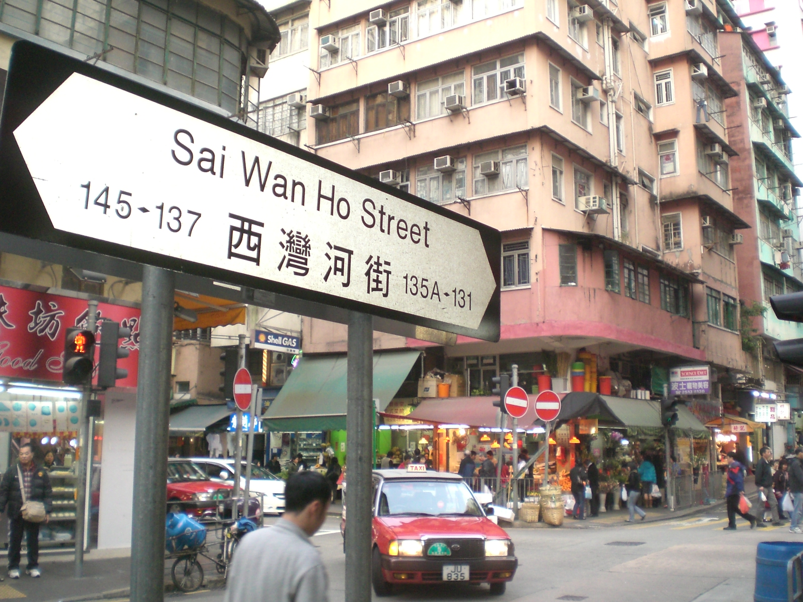 中文（香港）: 西灣河街市區。